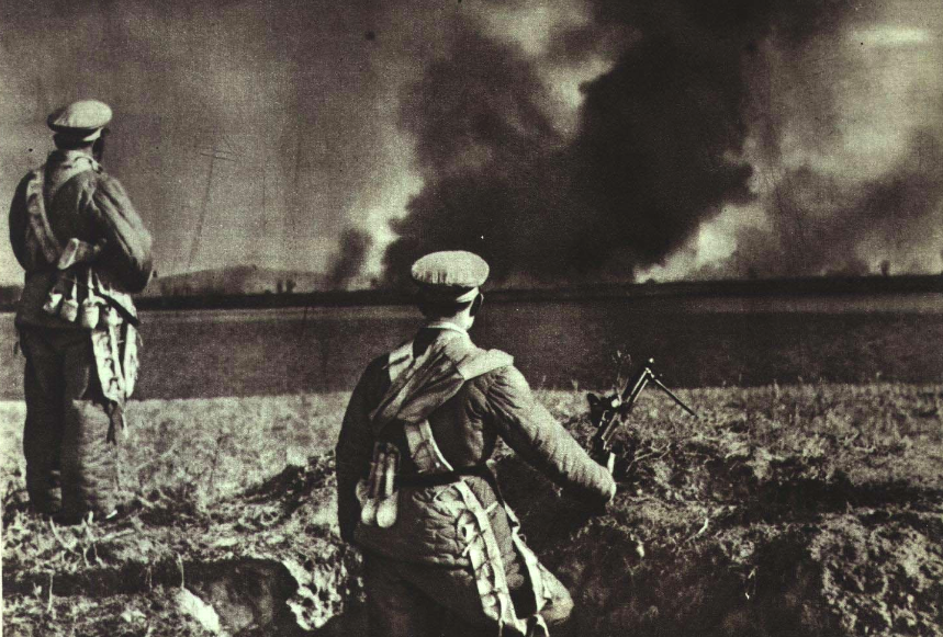 1950年，中国境内可以看到鸭绿江对岸美军轰炸的炮火